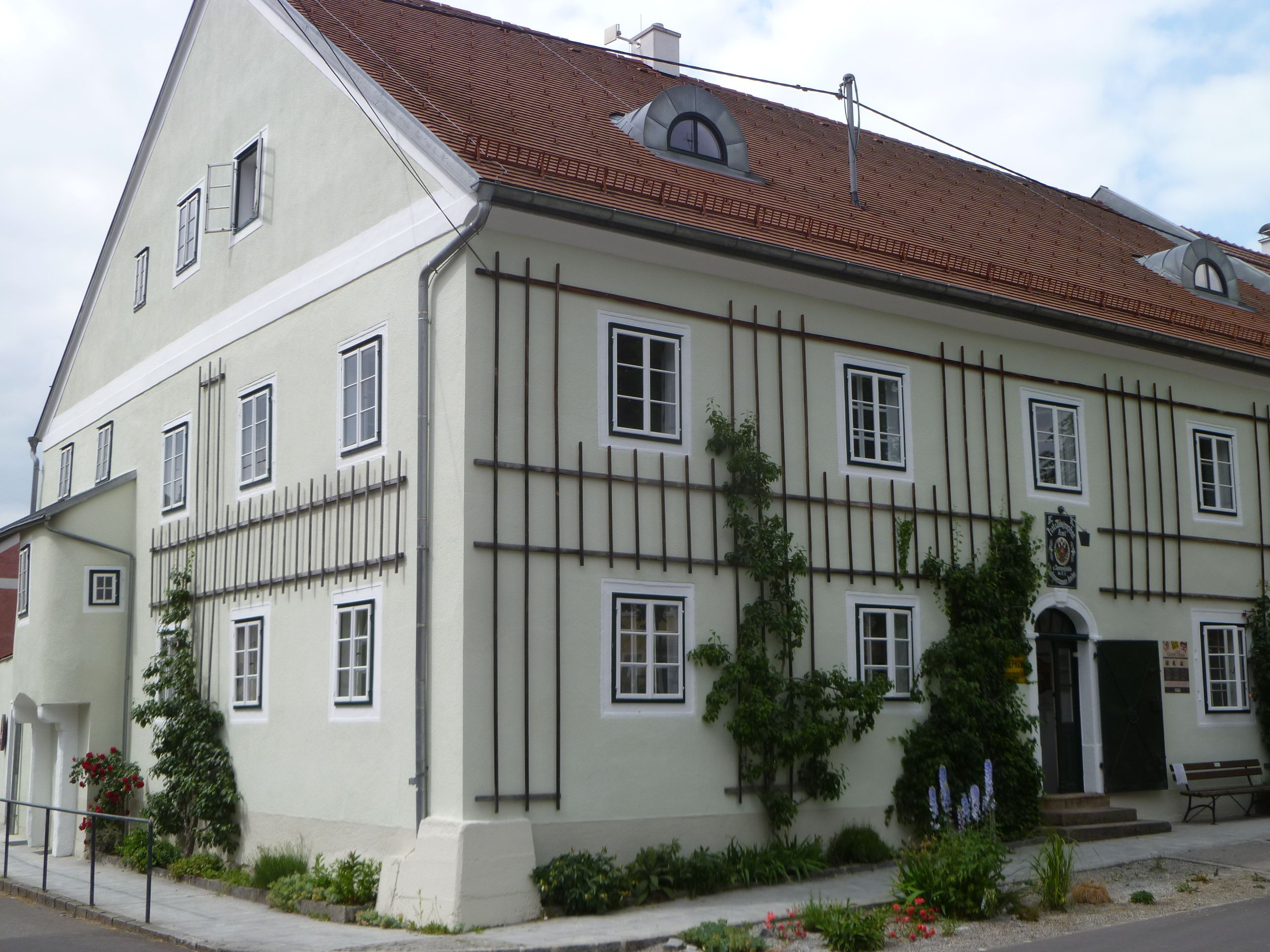 Marktbürgerhaus, sog. Gerstl-Haus